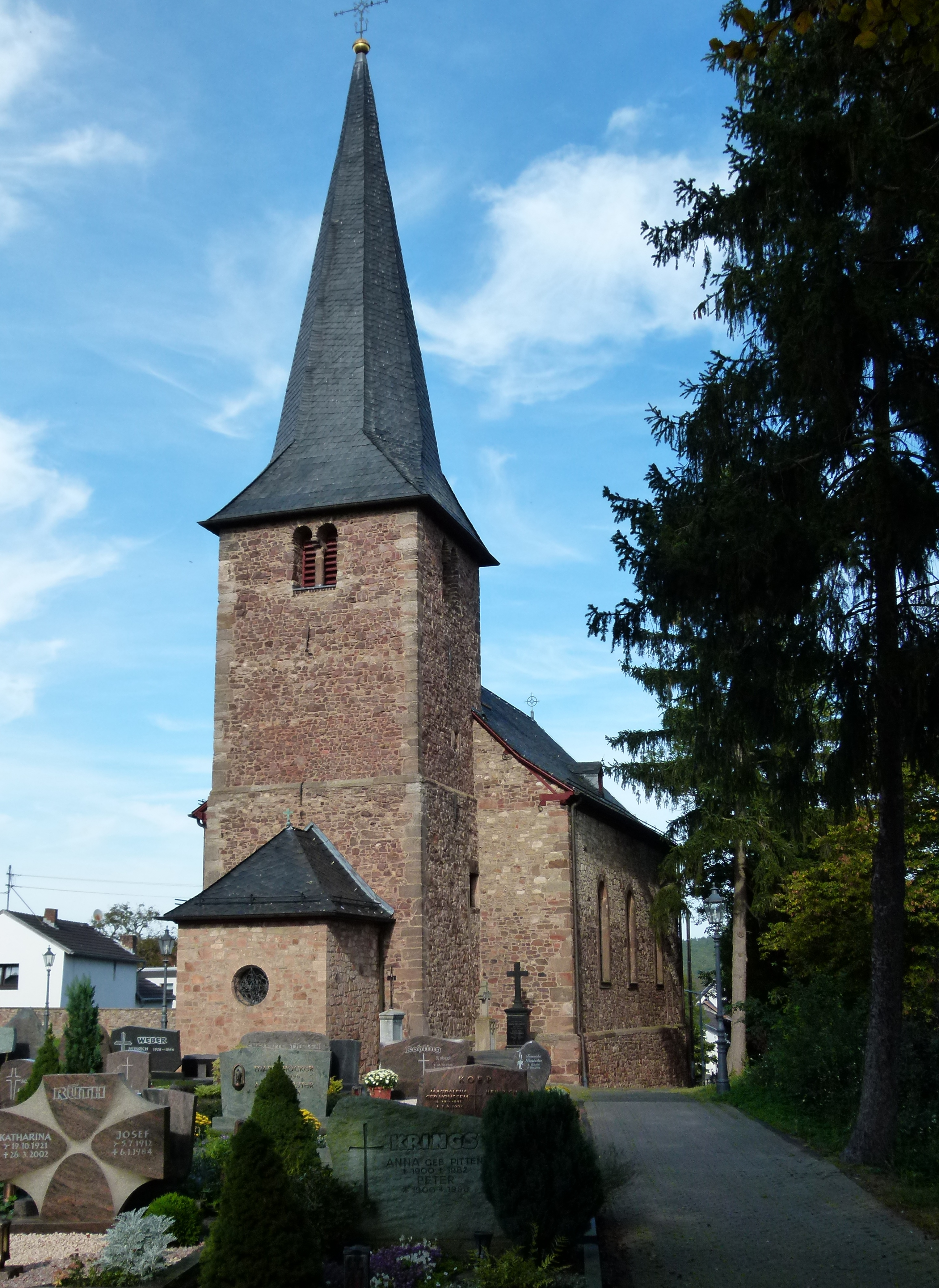 Katholische Kirche St.Pantaleon